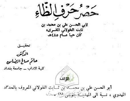 حصر حرف الظاء اسم المؤلف أبو الحسن علي بن محمد بن ثابت الخولاني المعروف بابن الحداد المهدوي